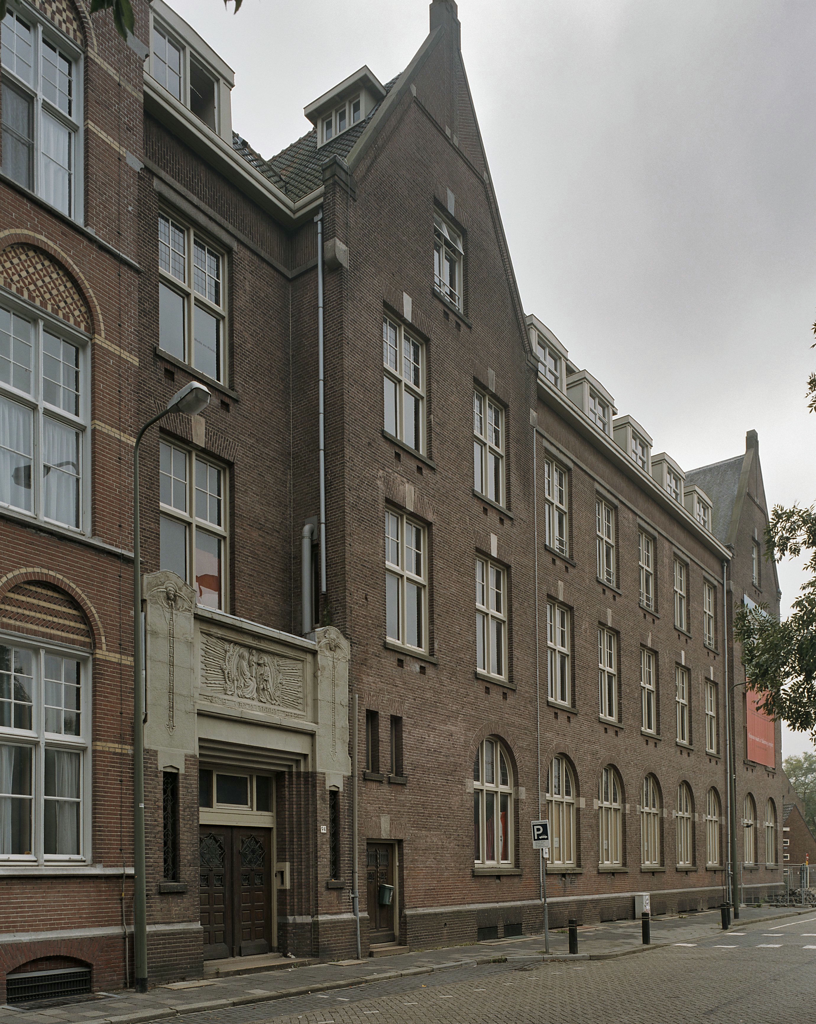 Overzicht voorgevel met entree (opmerking: Verbouwing tot apartementen)